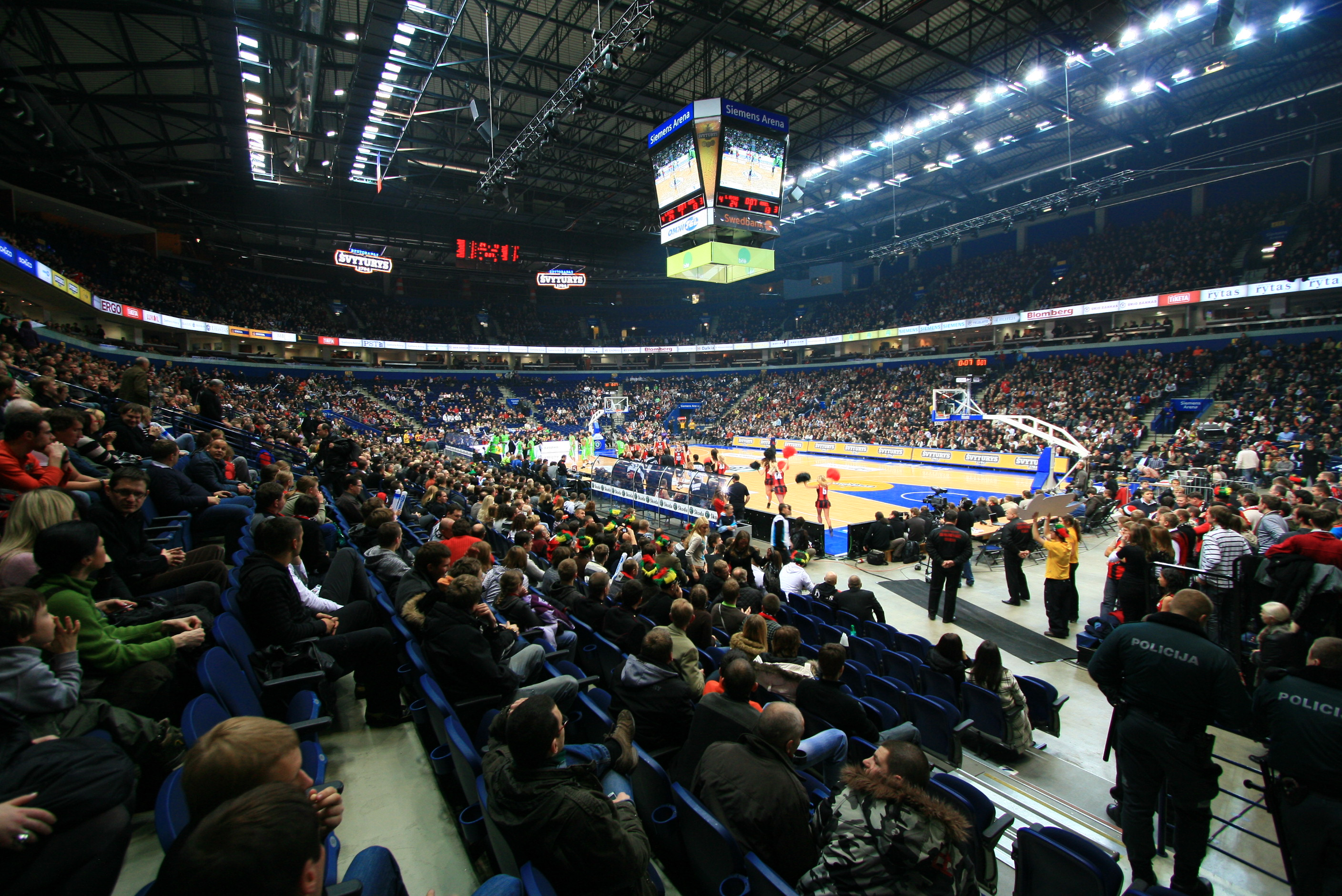 Siemens Arena during BC Lietuvos Rytas basketball match